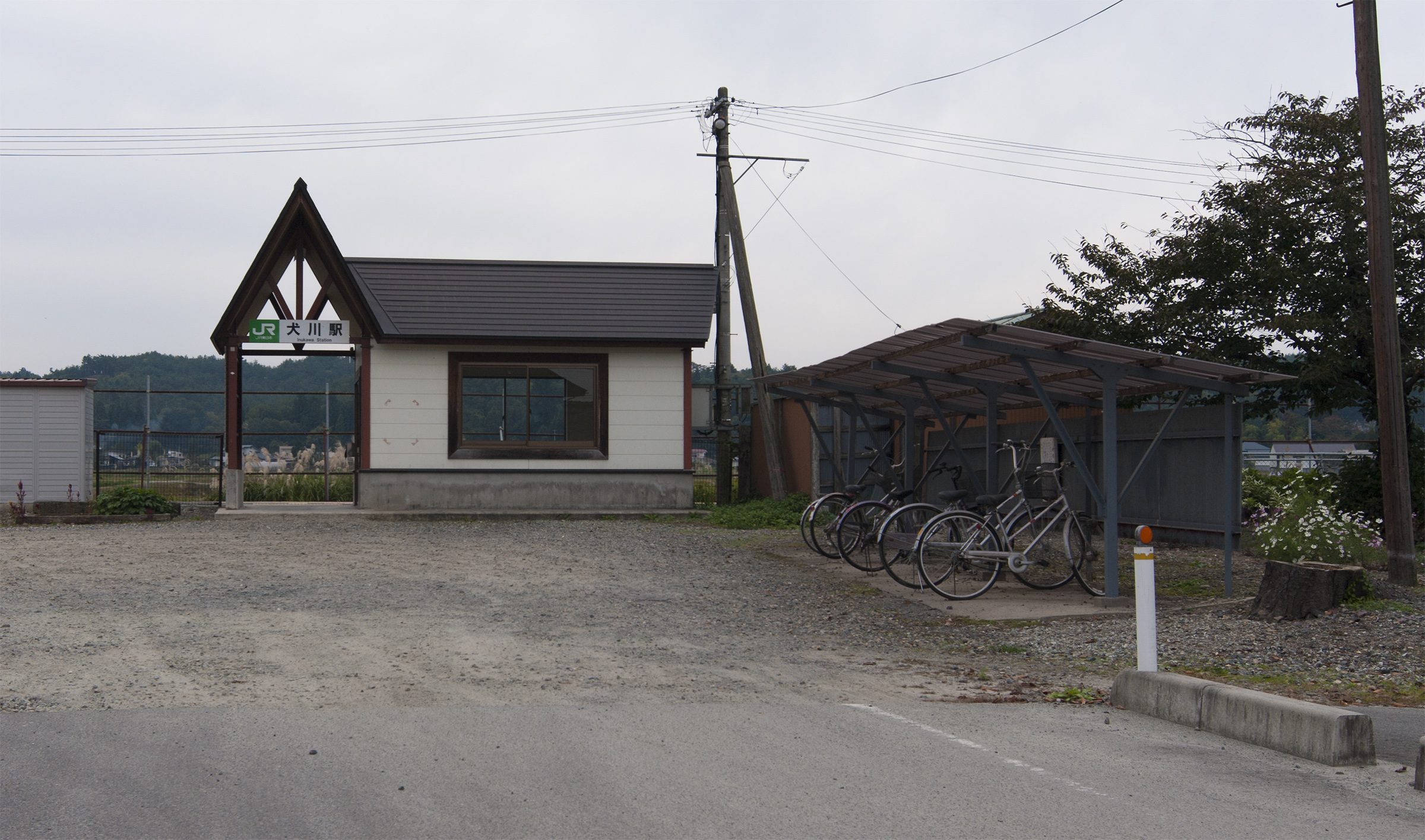 東日本旅客鉄道株式会社犬川駅駅舎